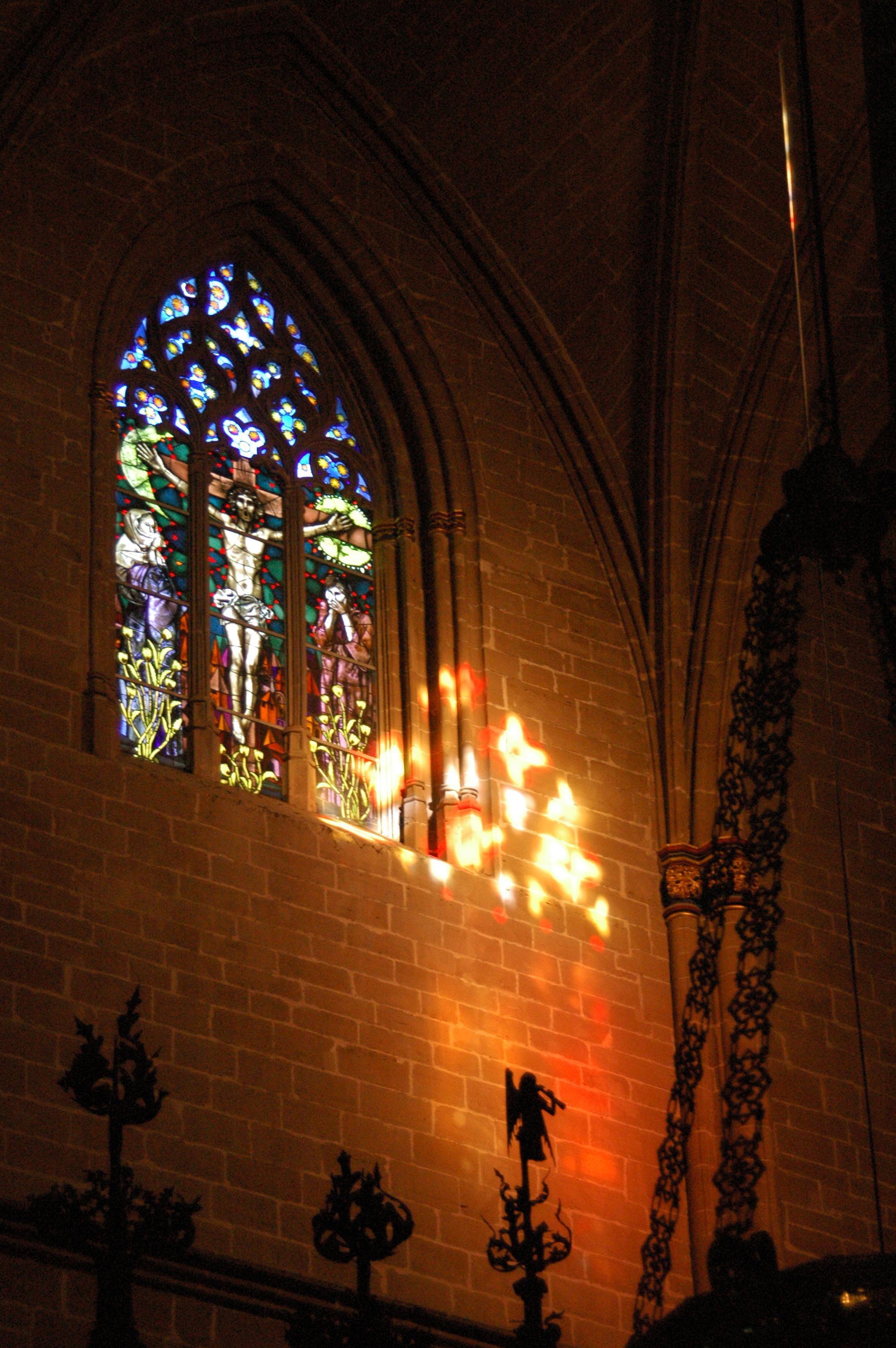 Interior y vidriera de la Catedral de Pamplona, España.